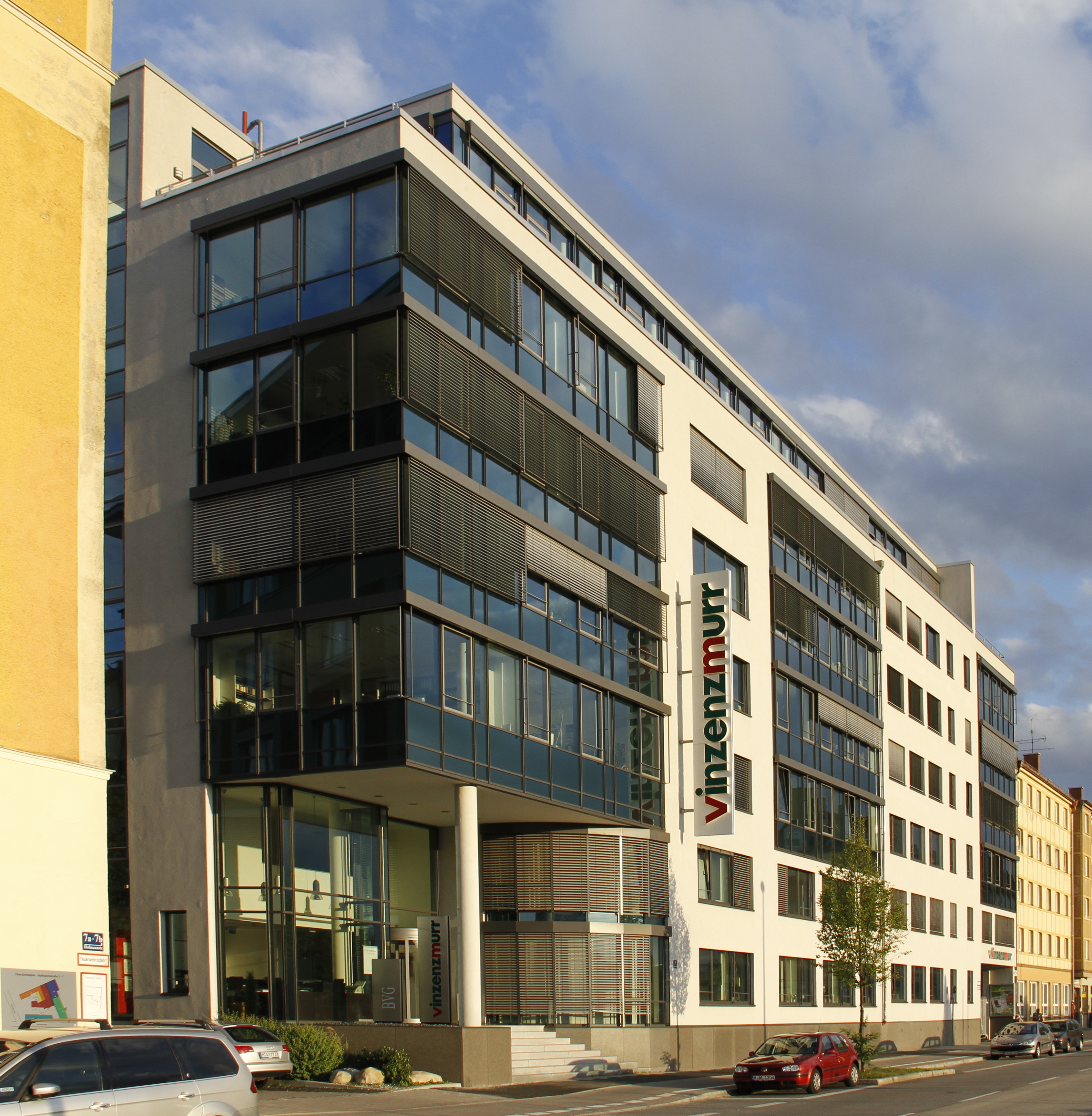 Zentrale von VinzenzMurr in der Münchner Hofmannstraße